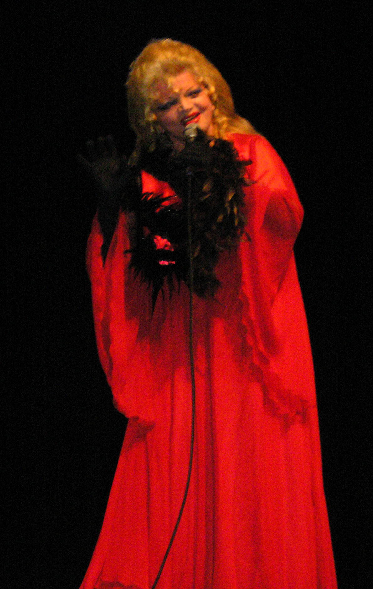 Violetta Villas, Ostrów Wielkopolski, Poland